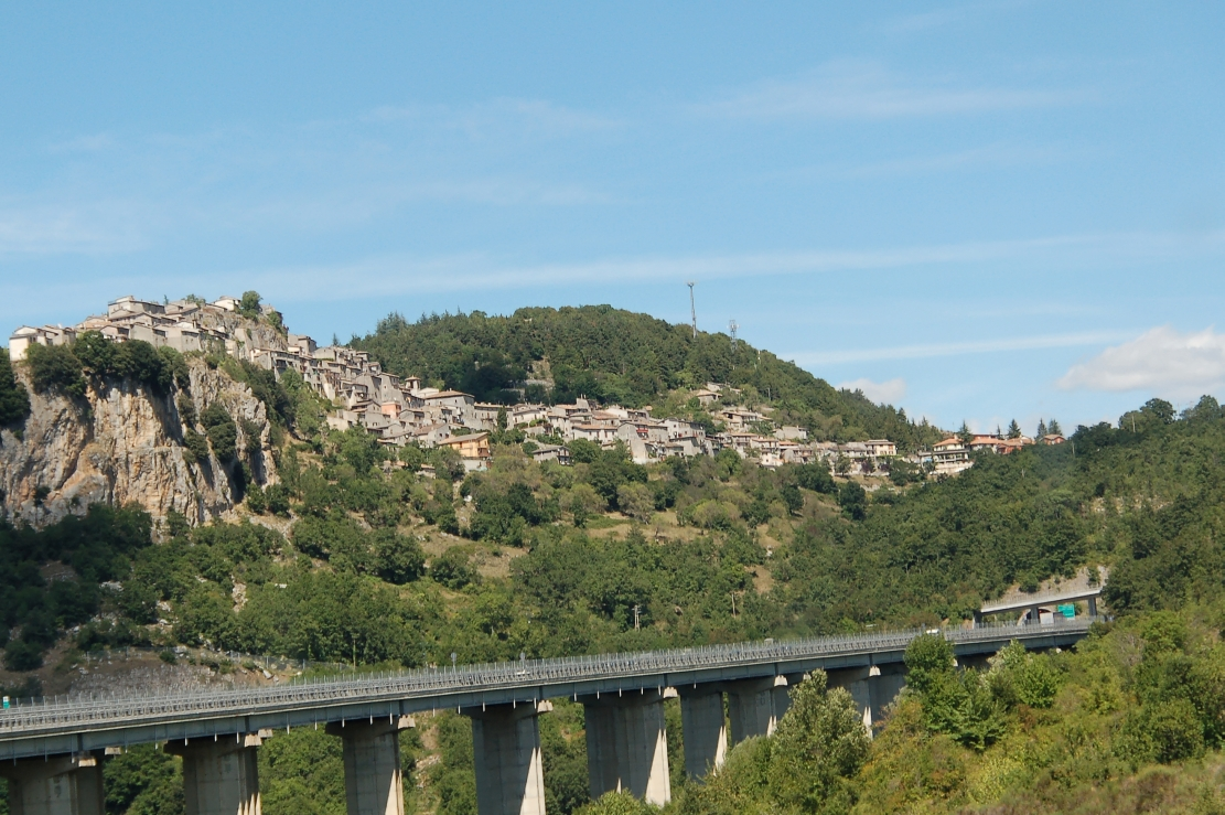 Autostrada A24 Italia